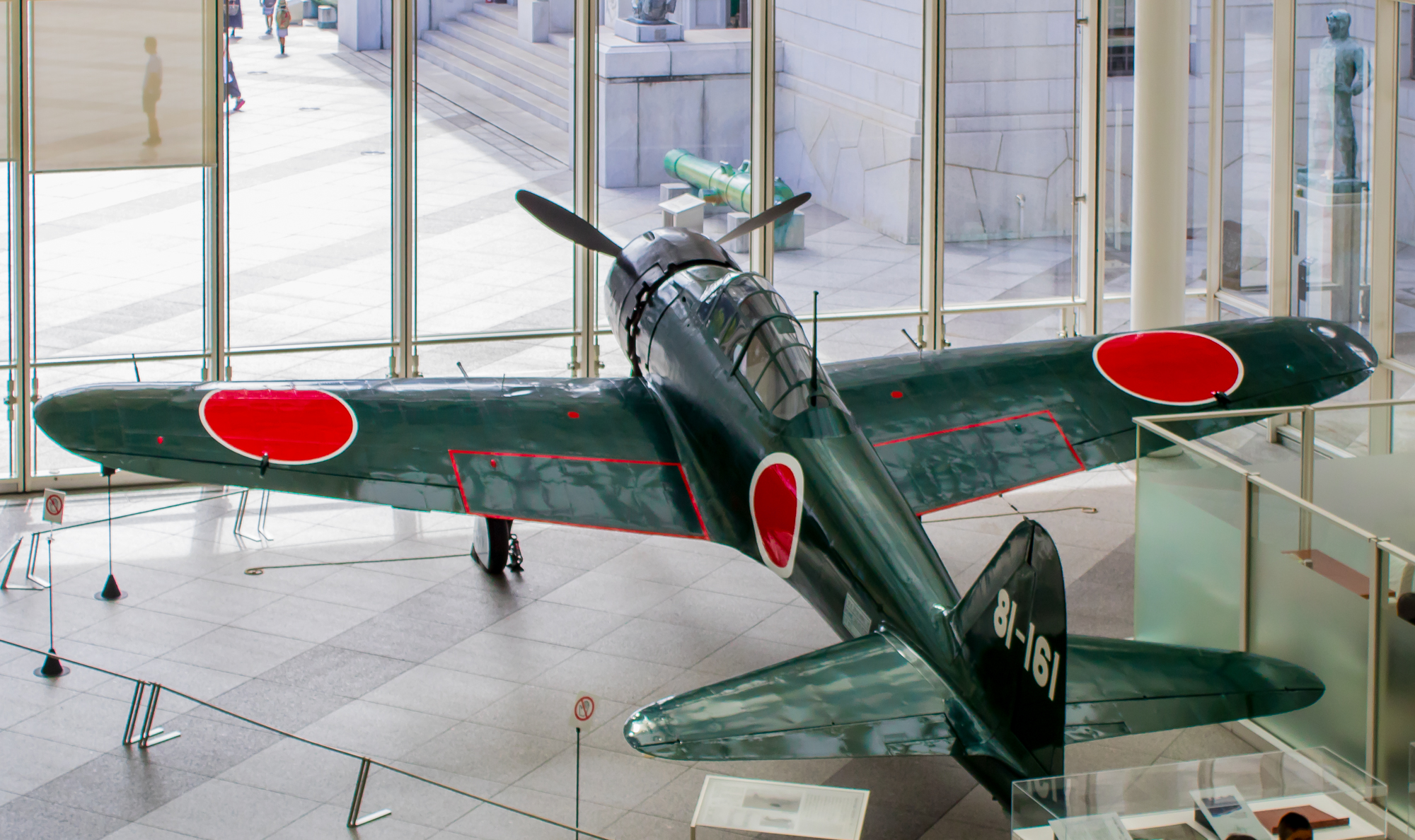 三菱零式艦上戦闘機五二型(A6M5)